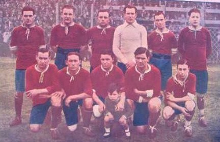 A Club Atlético Independiente football squad.